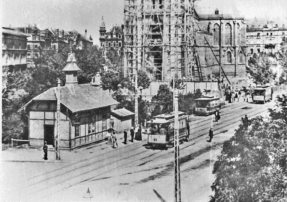 Das „Durlacher Tor“ in einem Foto, welches um 1900 entstanden ist, da die Bernharduskirche noch teilweise eingerüstet ist. Im Vordergrund sind Straßenbahnen erkennbar. Die Aufnahme wurde aus einer westsüdwestlichen Blickrichtung aufgenommen. Karlsruhe, Durlacher Tor, Blick nach O auf die St.Bernhard-Kirche (Aufn. vor 1914)